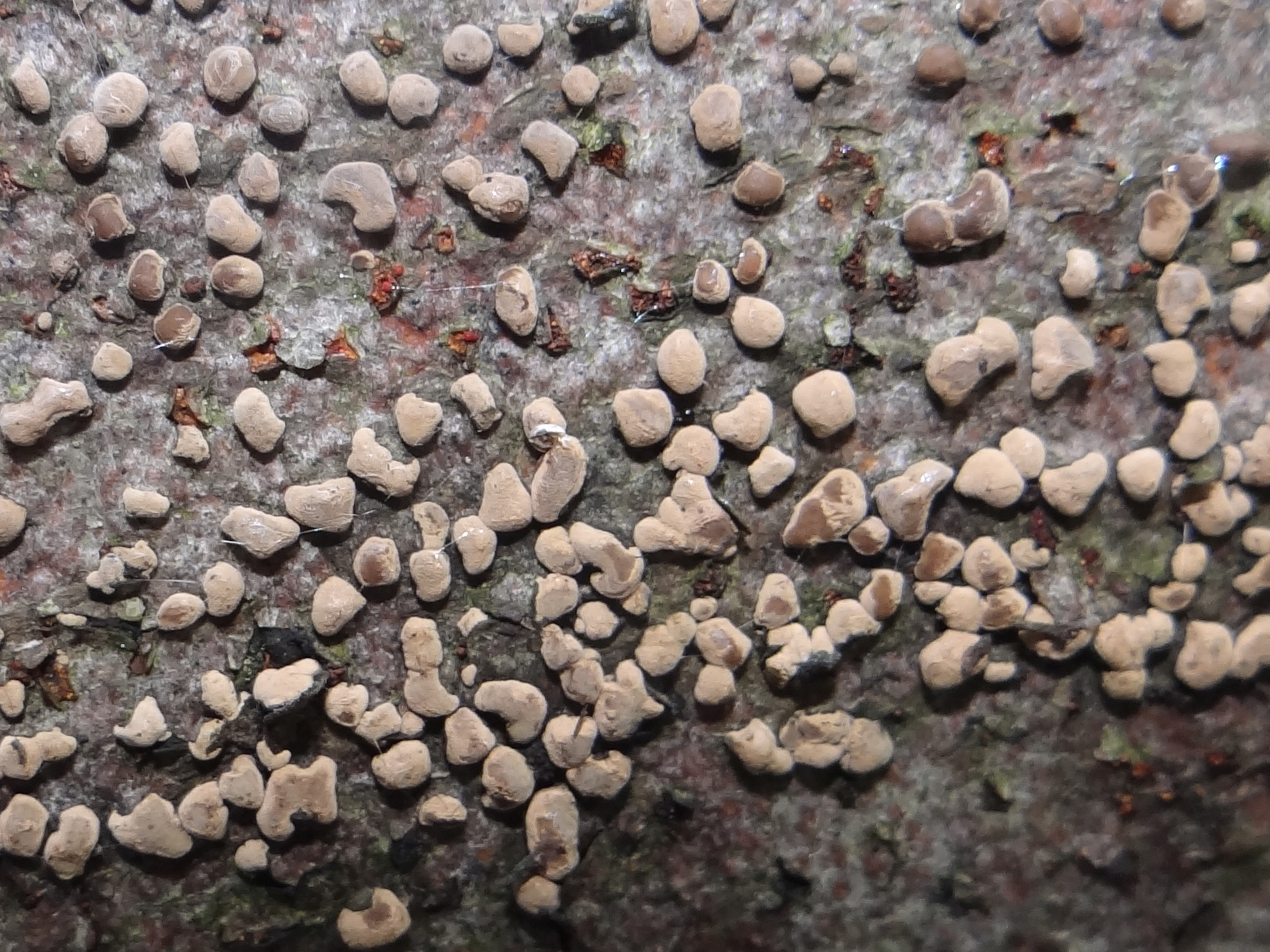 Annulohypoxylon cohaerens on Fagus sylvatica ( anamorphe). Location: Poland; rezerwat przyrody Kamionna